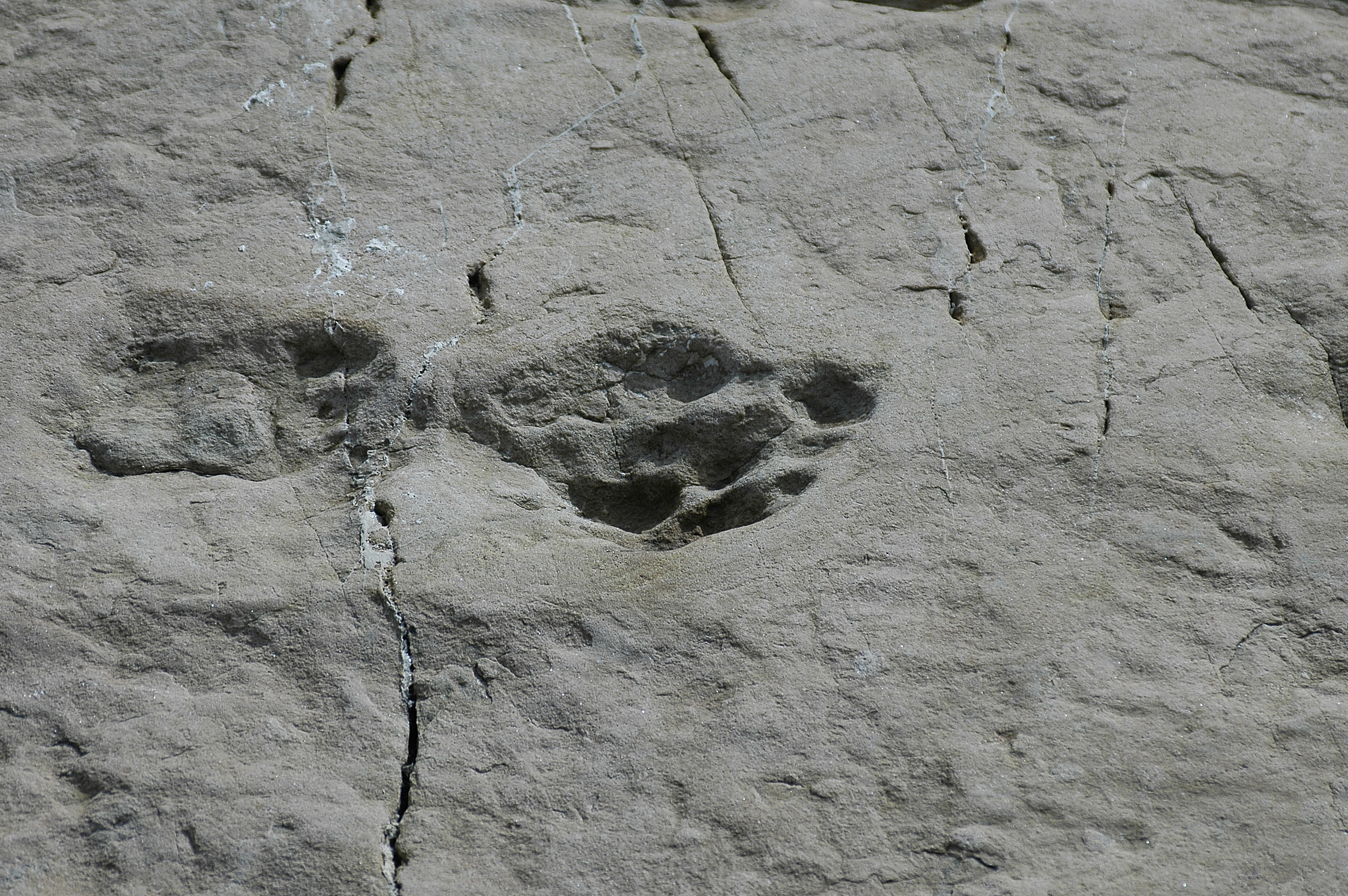 Détail n°1 des traces de dinosaures du cirque d'Émosson